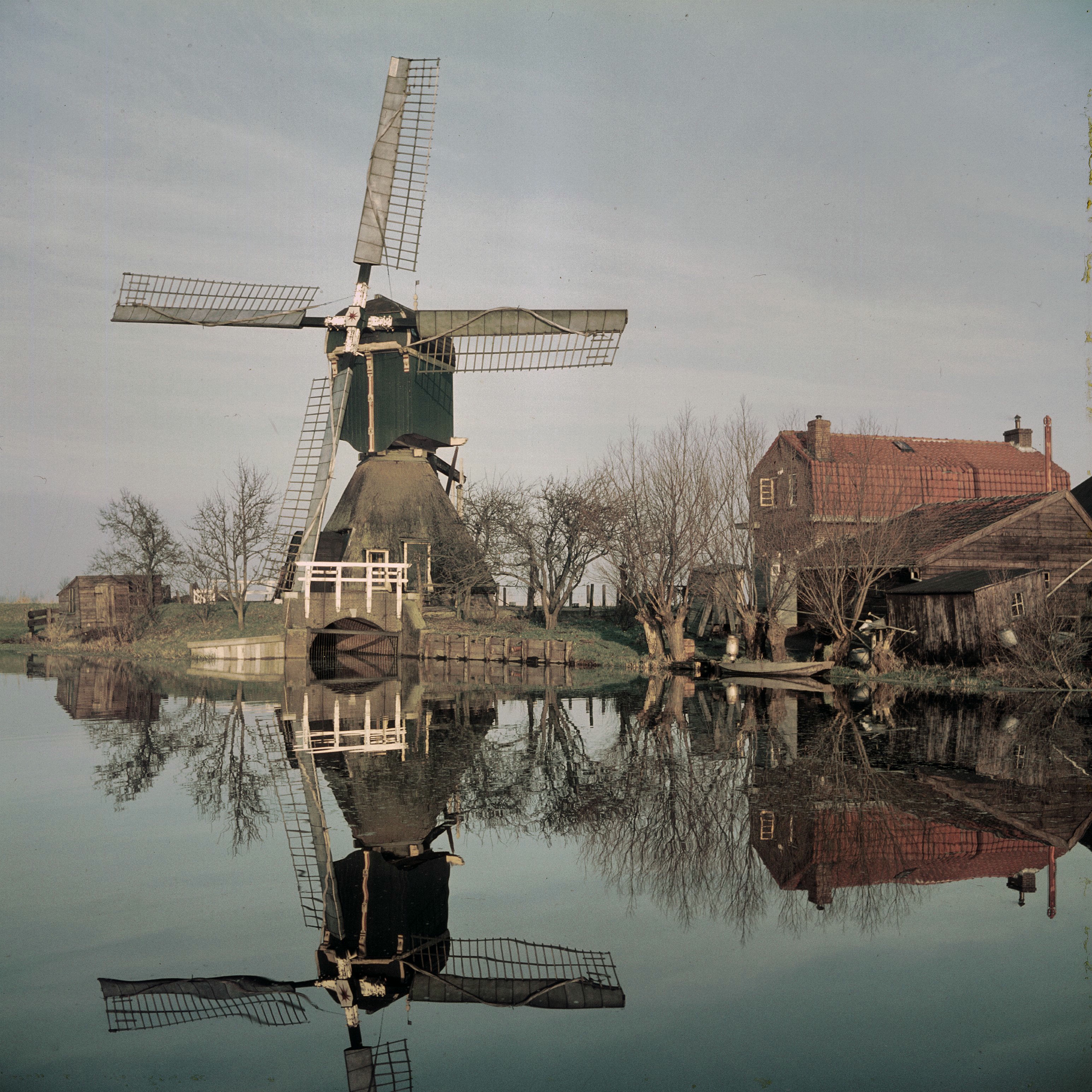 Oukoper Molen: Overzicht (opmerking: Diacollectie Molens)